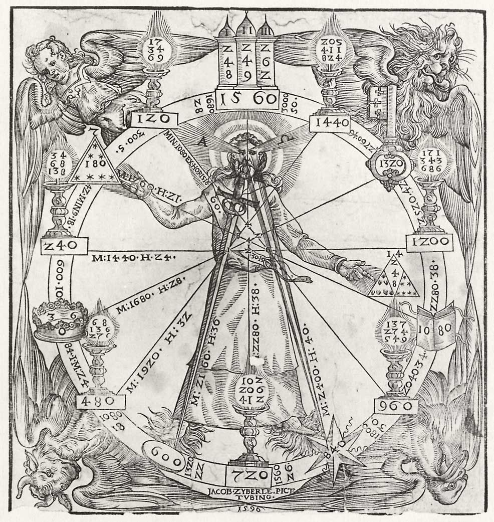 Prognosticon mit evangelischen Symbolen (Holzschnitt, 19,1 × 17,8 cm)